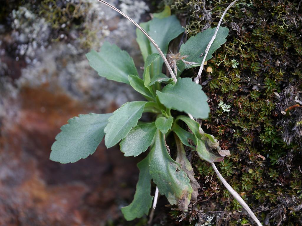 Aster tenuipes：クルマギク 2017/11/03 和歌山県田辺市：Tanabe City. Wakayama Pref. Japan